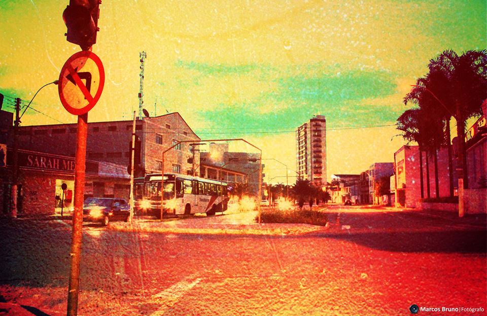 Catalão Goiás